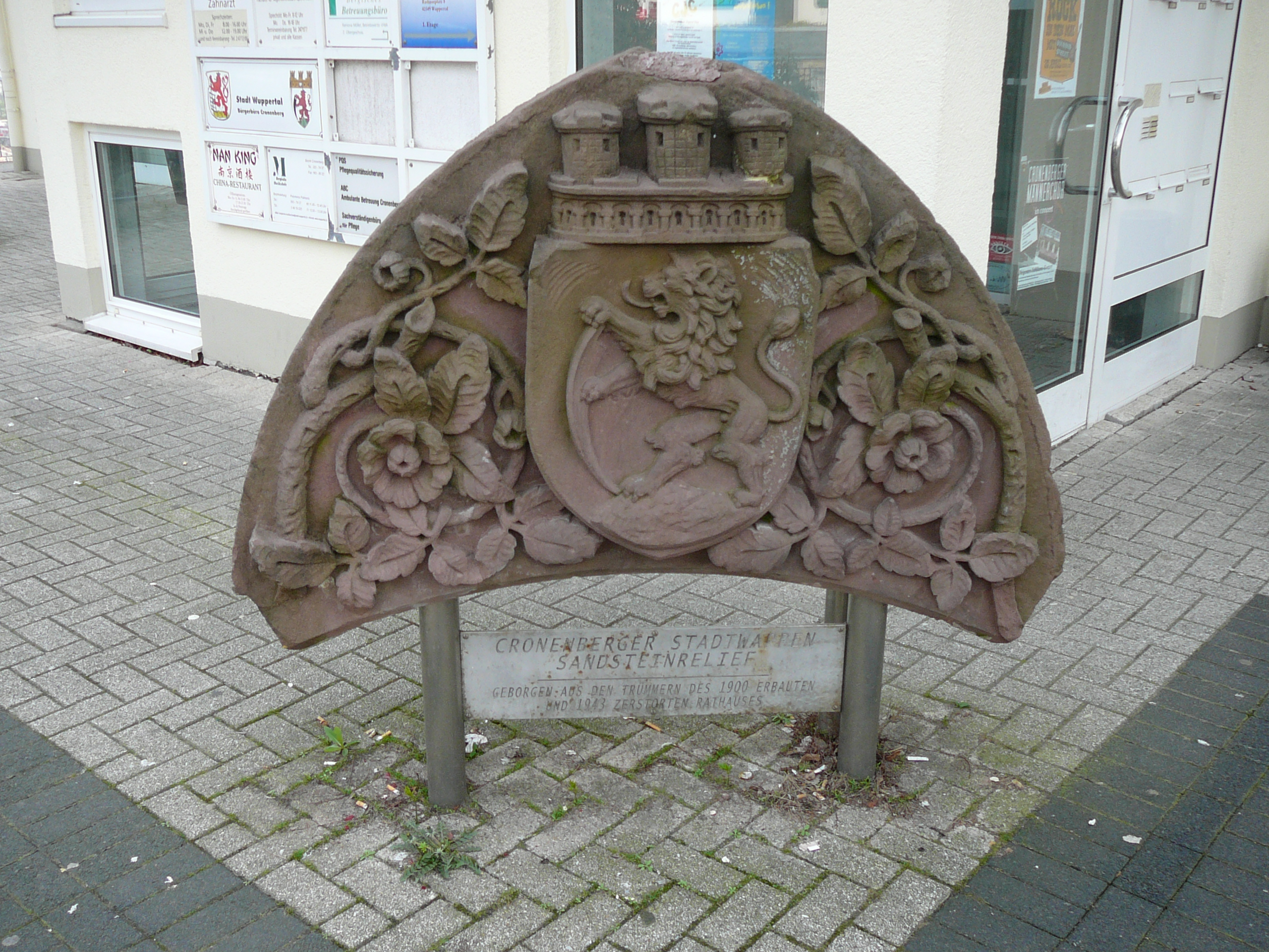 Rathausstraße, Wuppertal